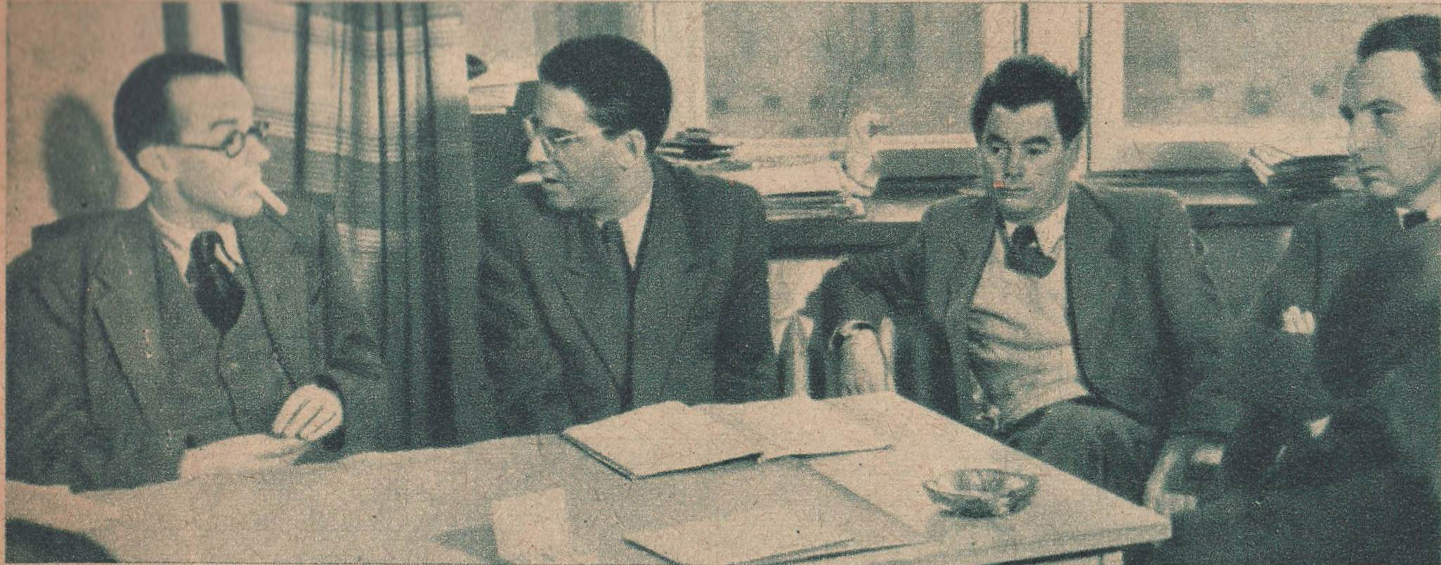 Konferencja "Swiatowej unii filmów dokumentalnych" w Warszawie: Basil Wright (left), Elmar Klos, Joris Ivens i Jerzy Toeplitz